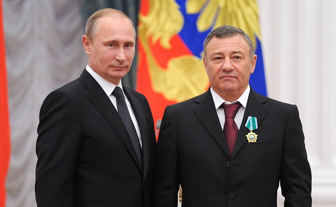 Орденом Дружбы награждён первый вице-президент Федерации дзюдо России Аркадий Ротенберг